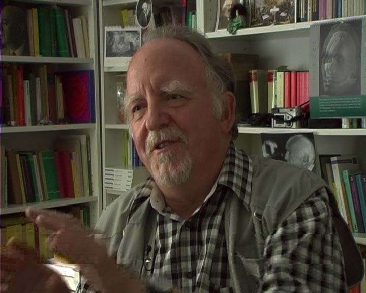 Herbert Schnaedelbach (umlaut changed to 'ae') in Glauben Wissen Kritisieren, Schnädelbach und die Hegelsche Milchschale 1 (Believing Knowing Criticizing, Schnaedelbach and the Hegelean Milk Bowl 1), D 2007, 99 min, by Jakob A. Bertzbach Bertzbach